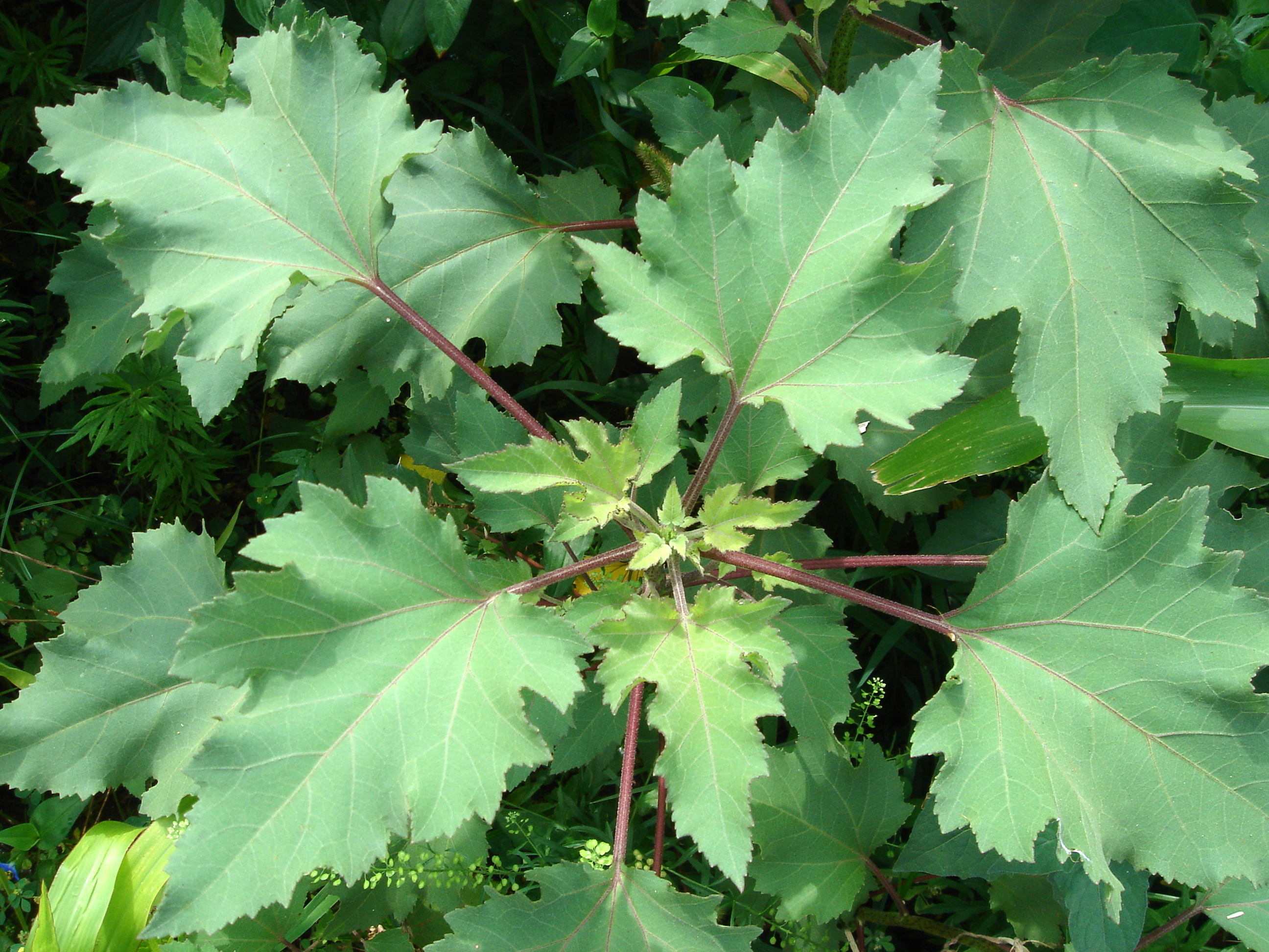 Xanthium strumarium